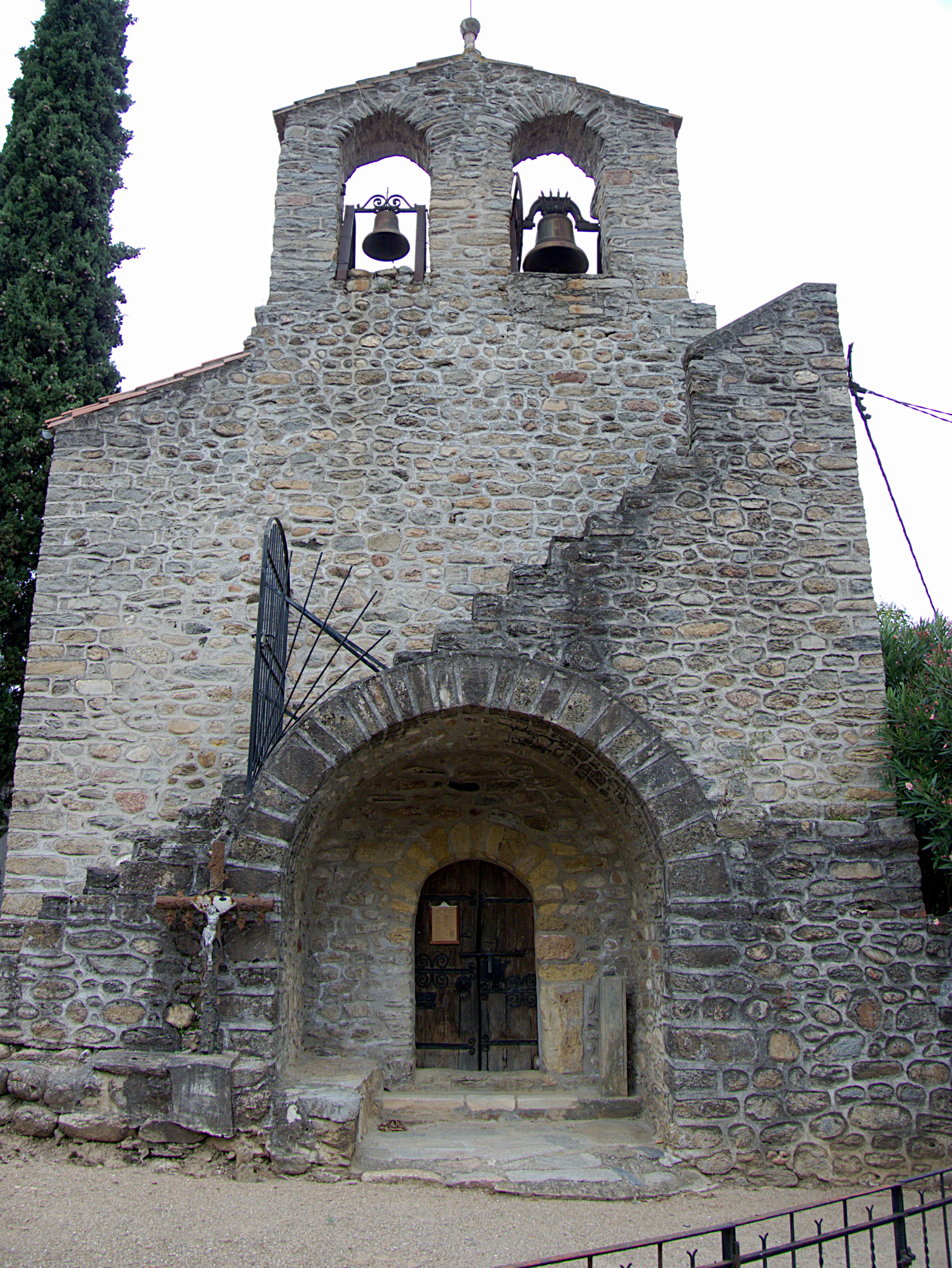 façade de l'entrée de l'Église Sainte-Marie, Le Vila, Reynès (Pyrénées-Orientales, Languedoc-Roussillon, France)